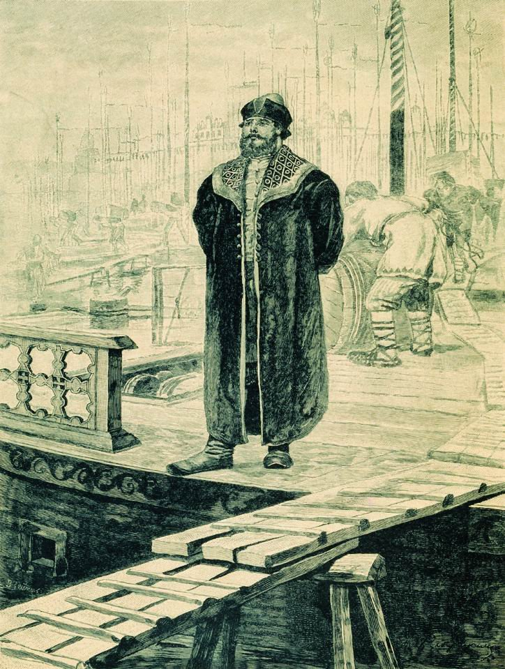 Садко, богатый новгородский гость. 1895. Иллюстрация к книге "Русские былинные богатыри"